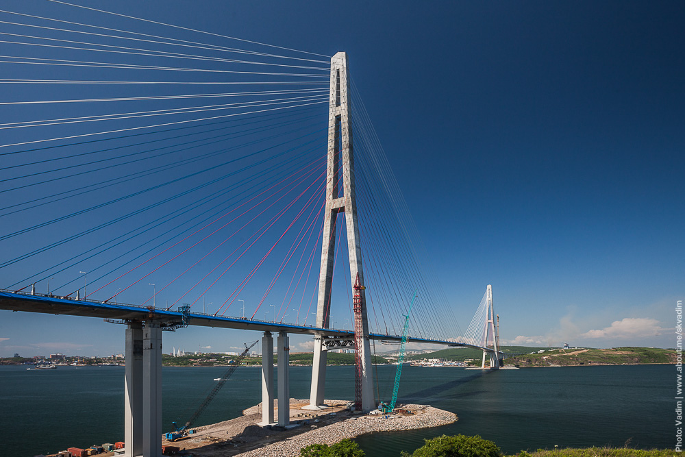 Мост на остров Русский через пролив Босфор-Восточный / Bridge to Russky island across the Eastern Bosphorus strait